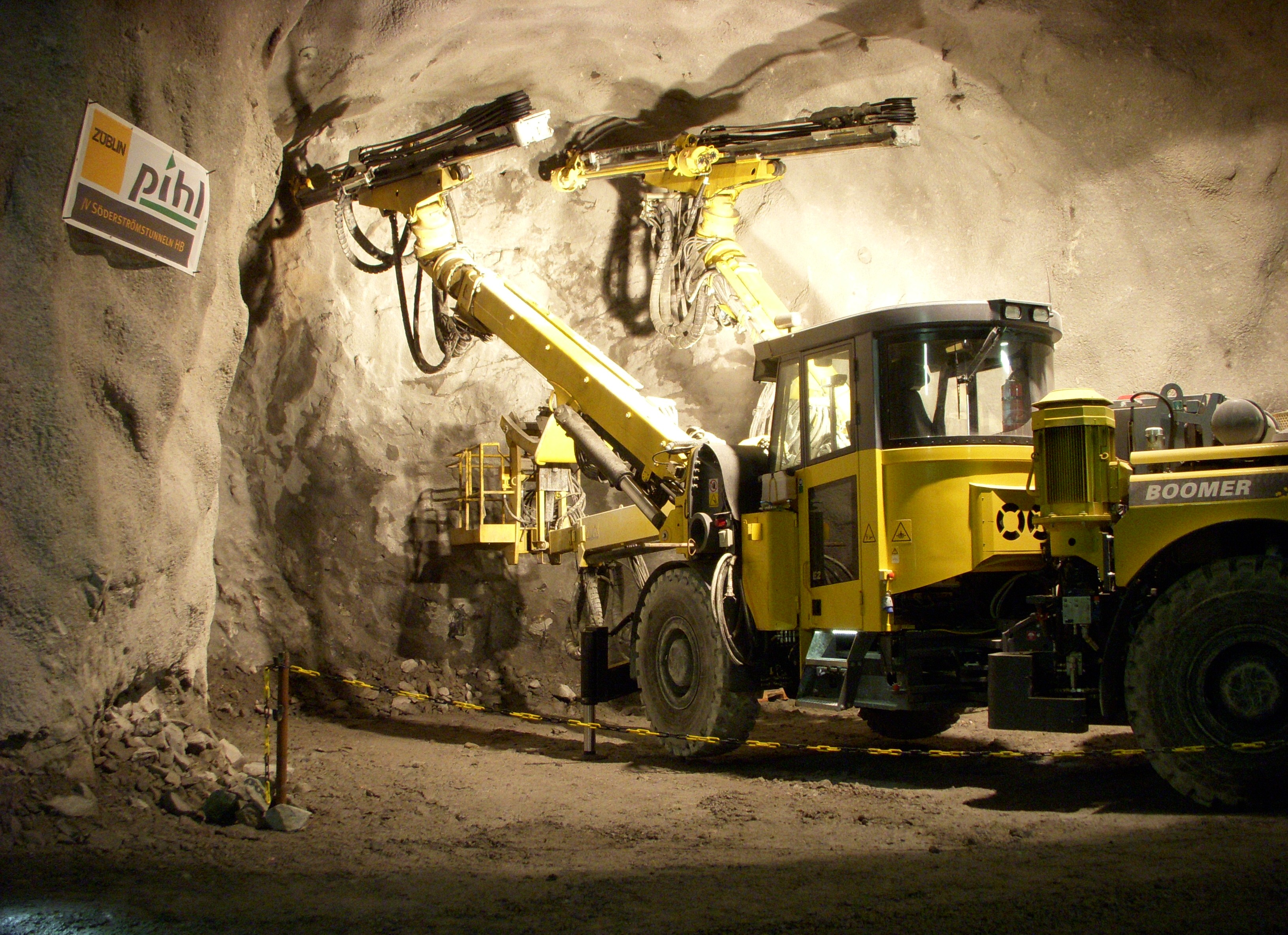 Citybanan, Södermalmstunnelns arbetstunnel, visning den 2009-09-20